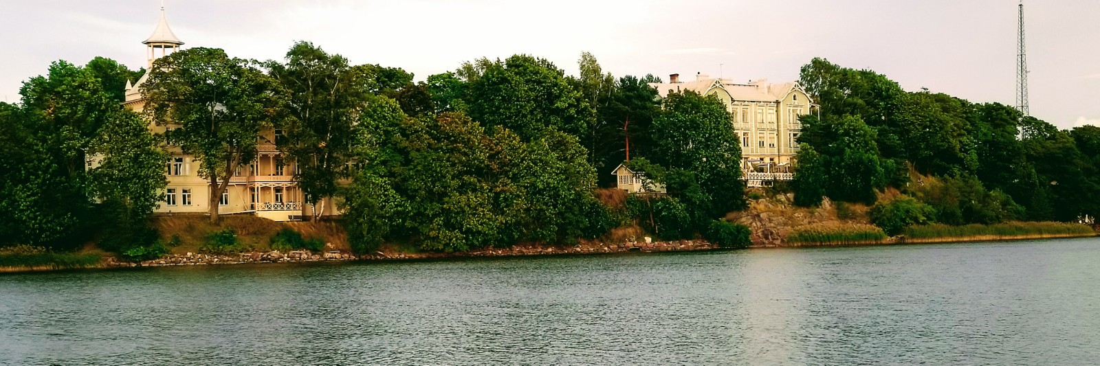 Linnunlaulu